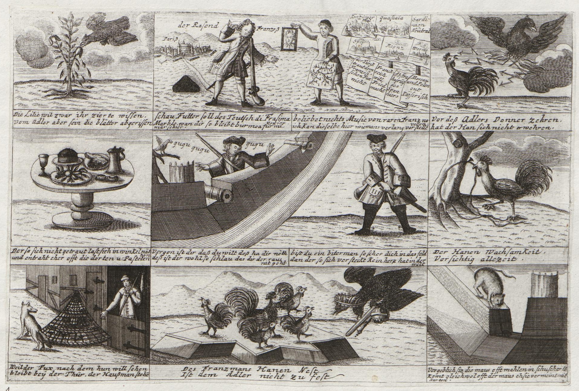 Grafik aus dem Klebeband Nr. 18 der Fürstlich Waldeckschen Hofbibliothek Arolsen Motiv: Bilderbogen zum Polnischen Thronfolgekrieg (1733–1738), erwähnt ist u. a. die Schlacht bei Guastalla (19. September 1734) "Die Lilie wil zwar ihr zierte wissen, vom Adler aber sein die blätter abgerissen…"